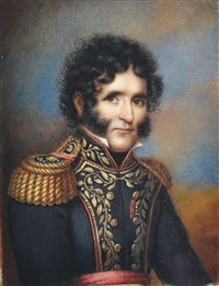 Portrait of Facundo Quiroga